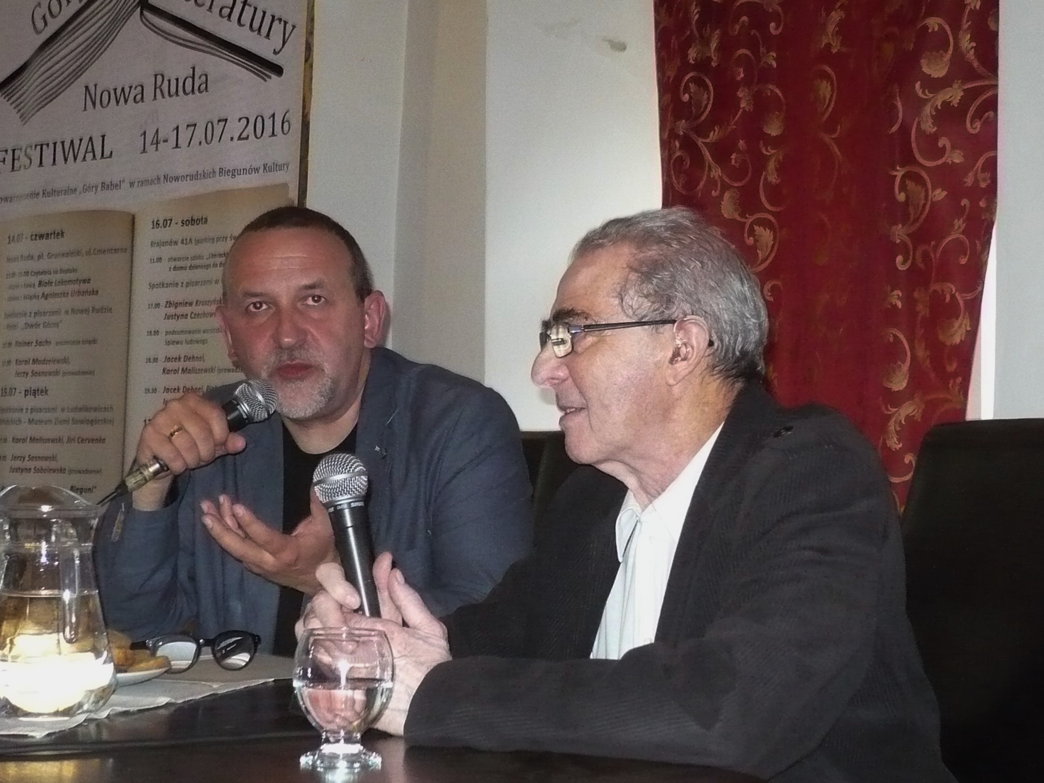 Jerzy Sosnowski i Karol Modzelewski w Nowej Rudzie.